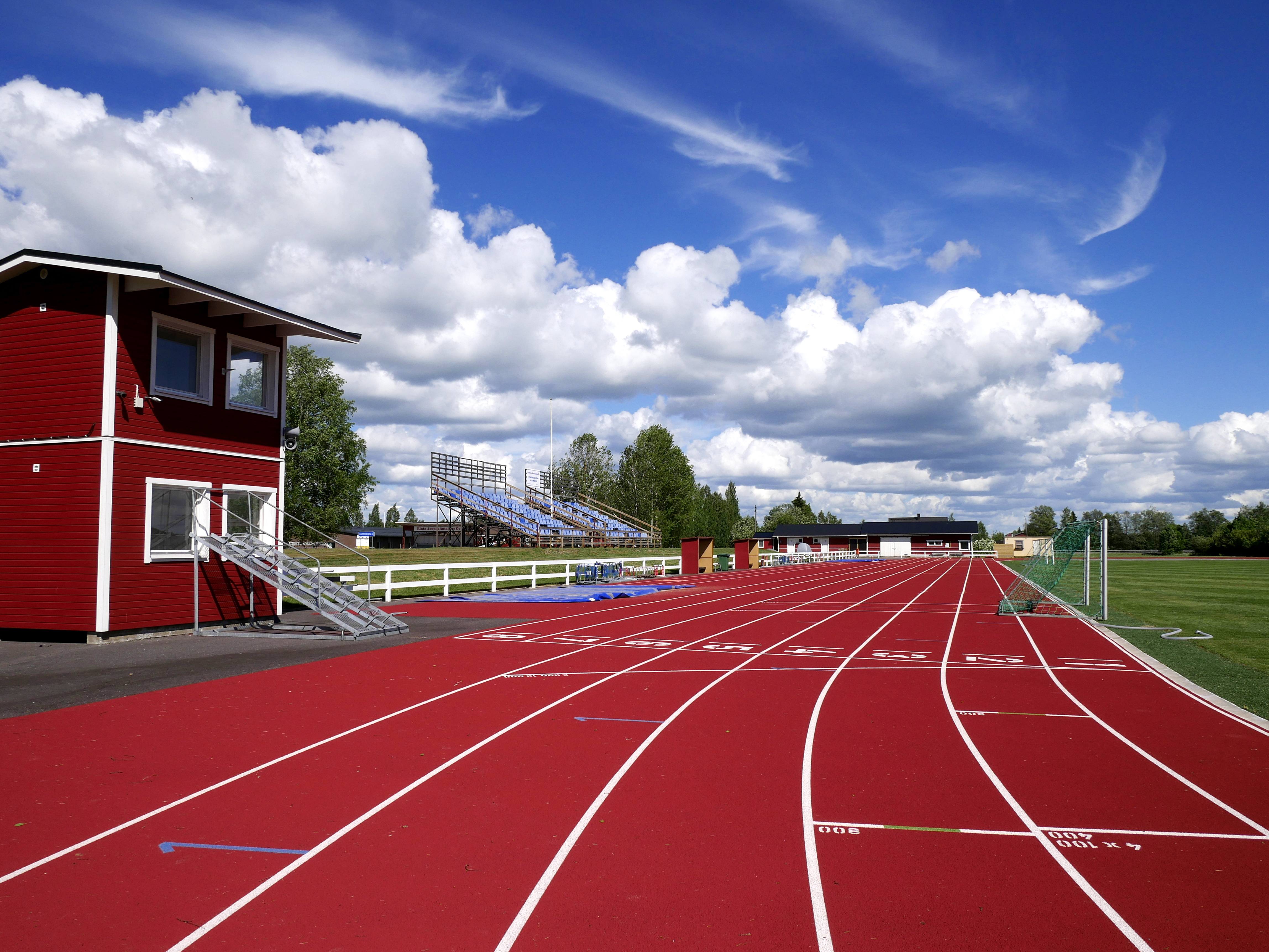 Kyrölän kenttä Vähässäkyrössä.